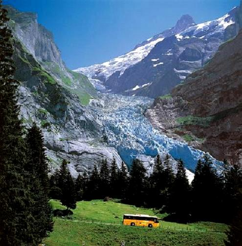 View of Oberen Grindelwaldgletscher in Bernese Oberland